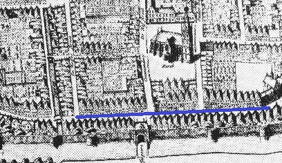 De Hoogstraat in Montfoort op een prent uit 1649.